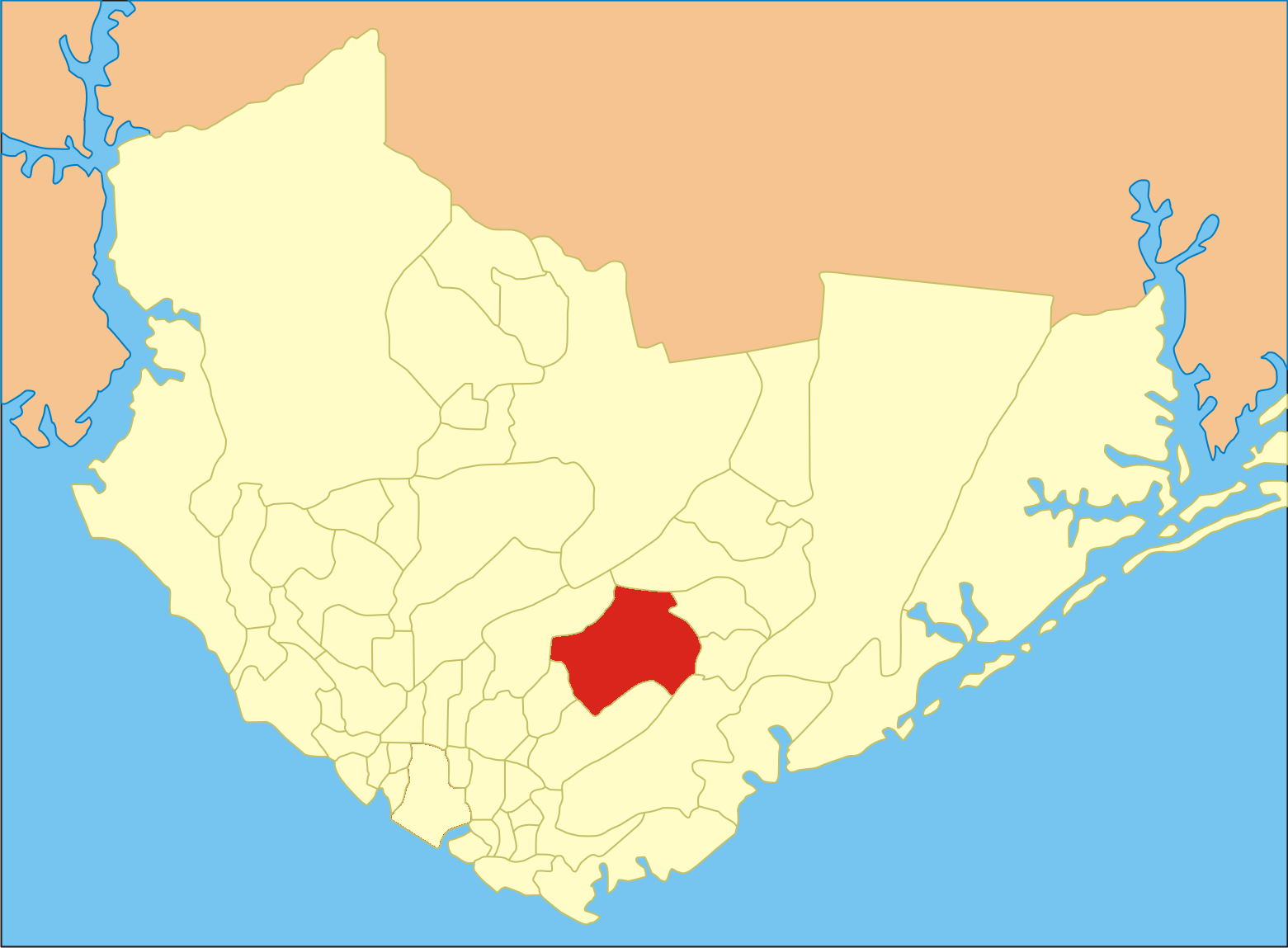 Localização do bairro em Manaus